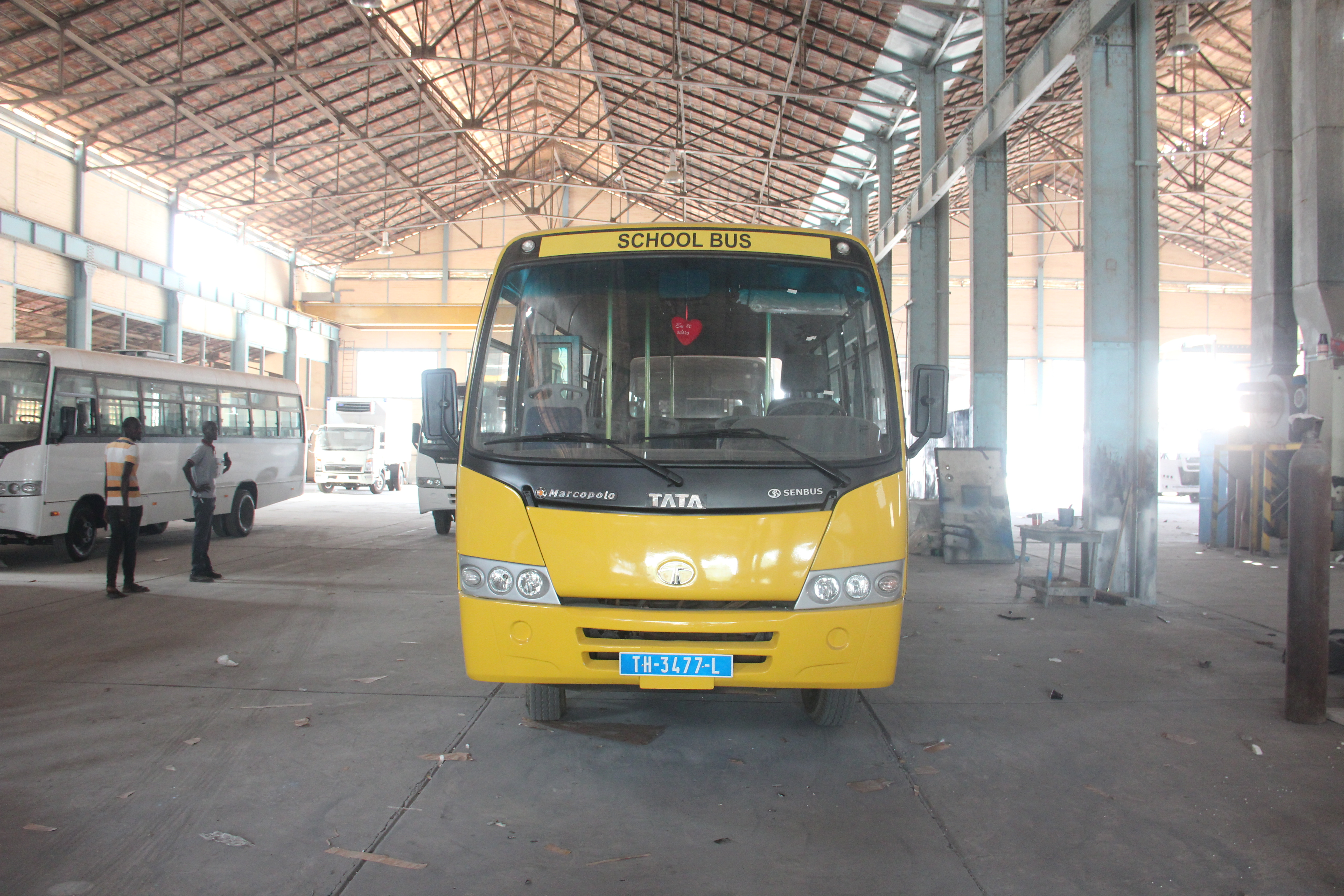 Bus scolaire pour l'école bilingue Avenir de Ngaparou, dans l'usine Senbus de Thiès. This is an image with the theme "Africa on the Move or Transport" from: Senegal